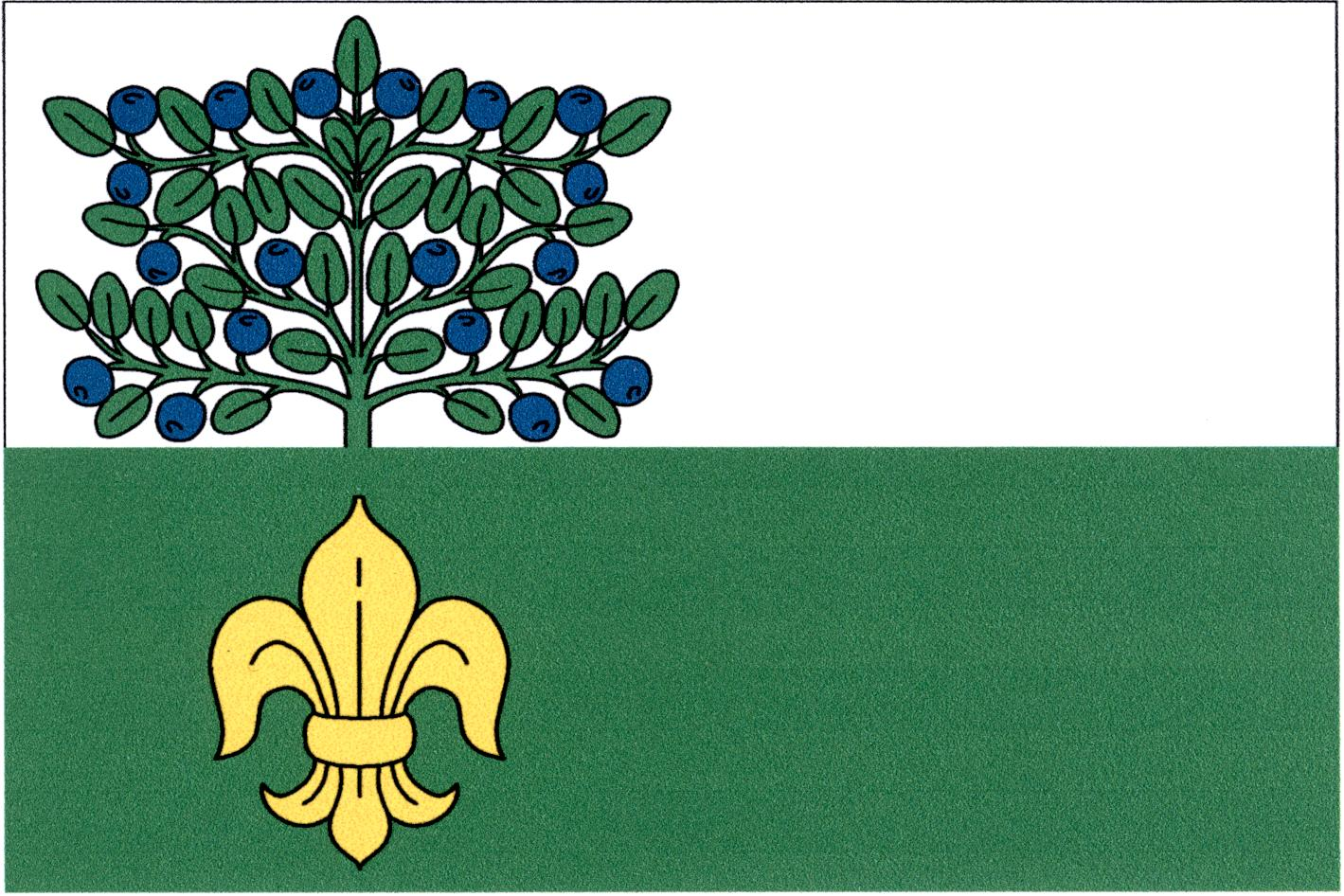 Vlajka obce Horka (okres Chrudim)